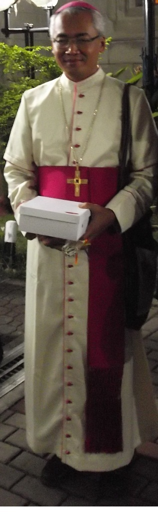 Uskup Keuskupan Ketapang, Mgr. Pius Riana Prapdi